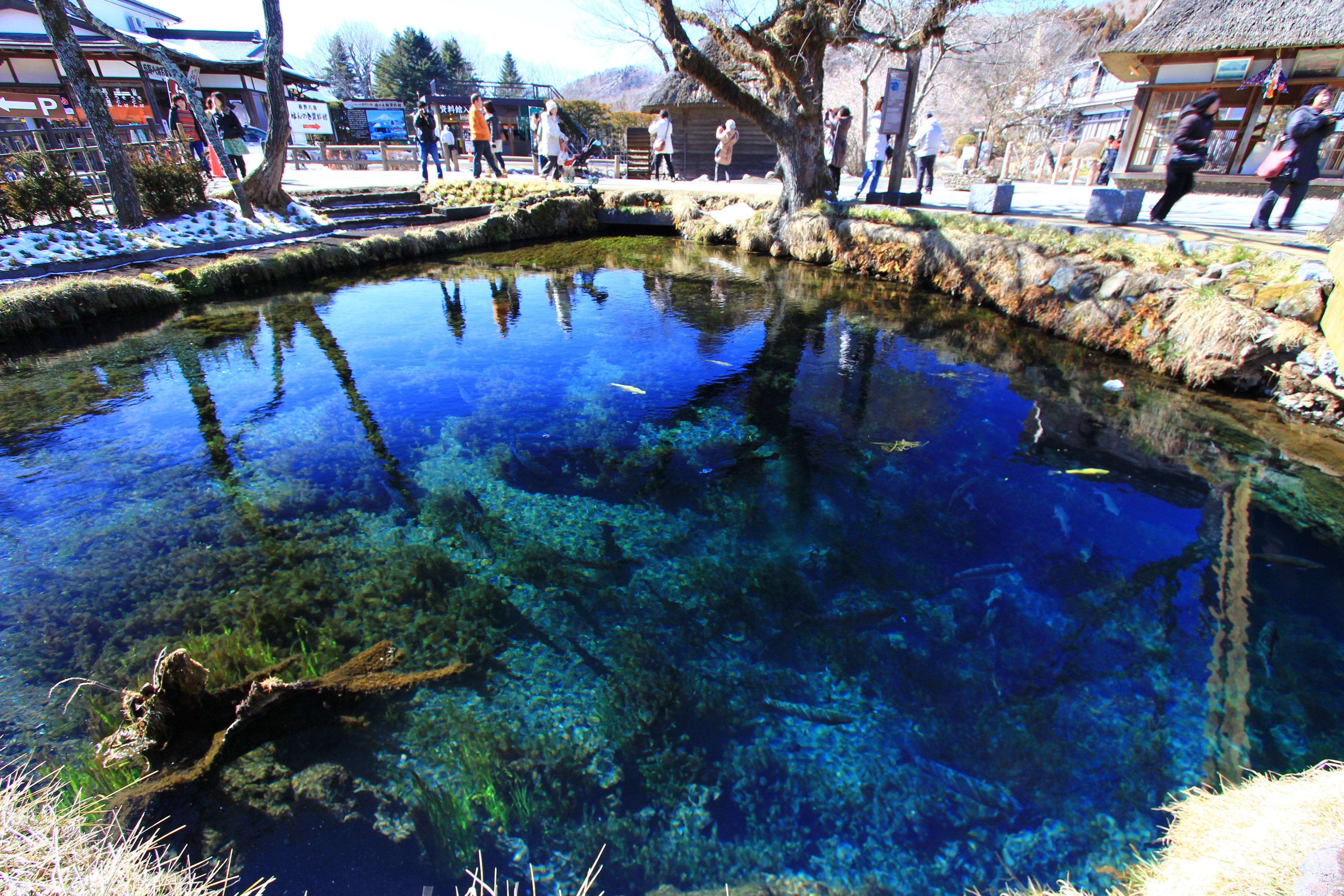 忍野八海, 湧池 (Waku pond)